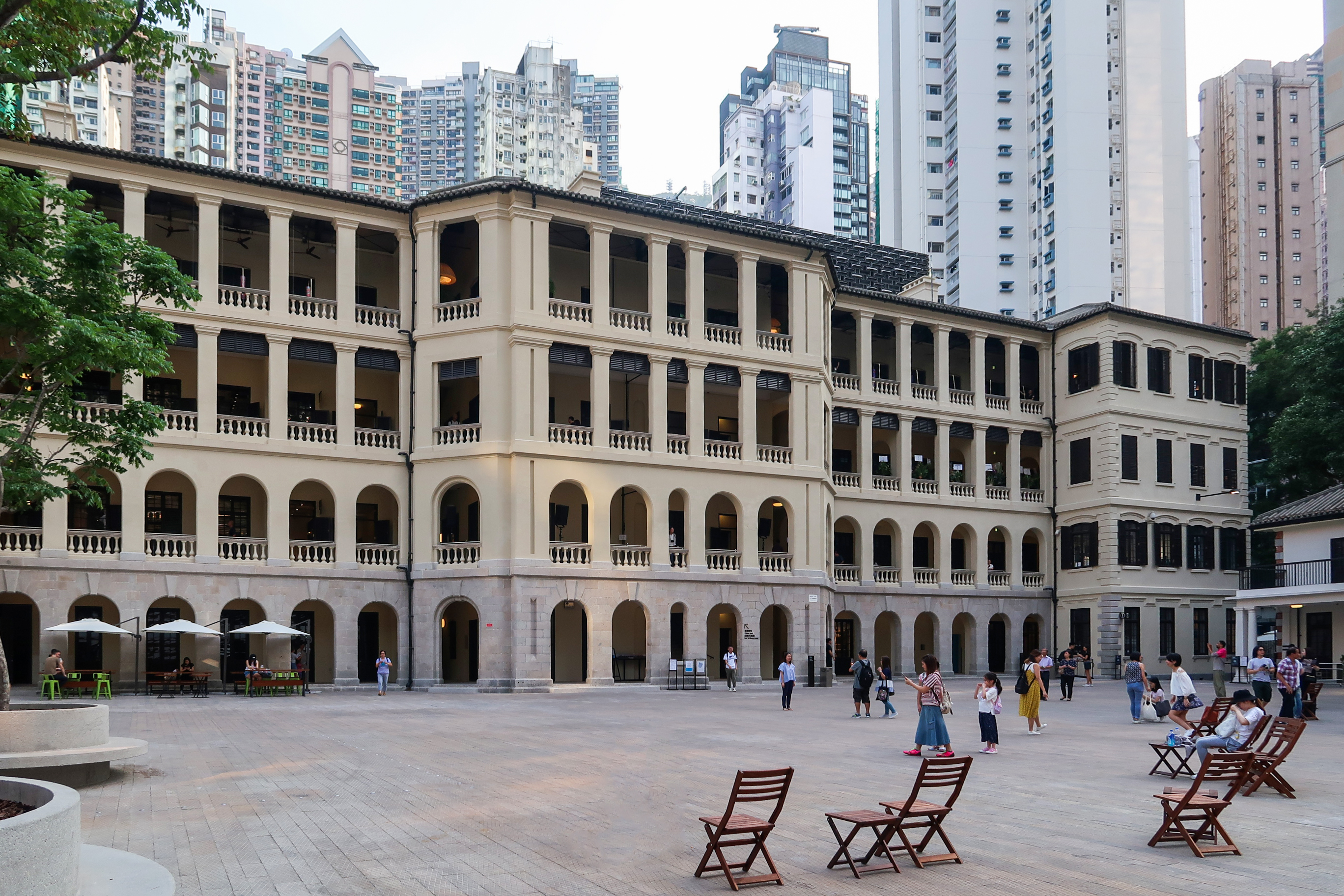 Tai Kwun Barrack Block